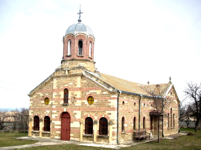 Село Кардам, община Попово. Църковният храм.